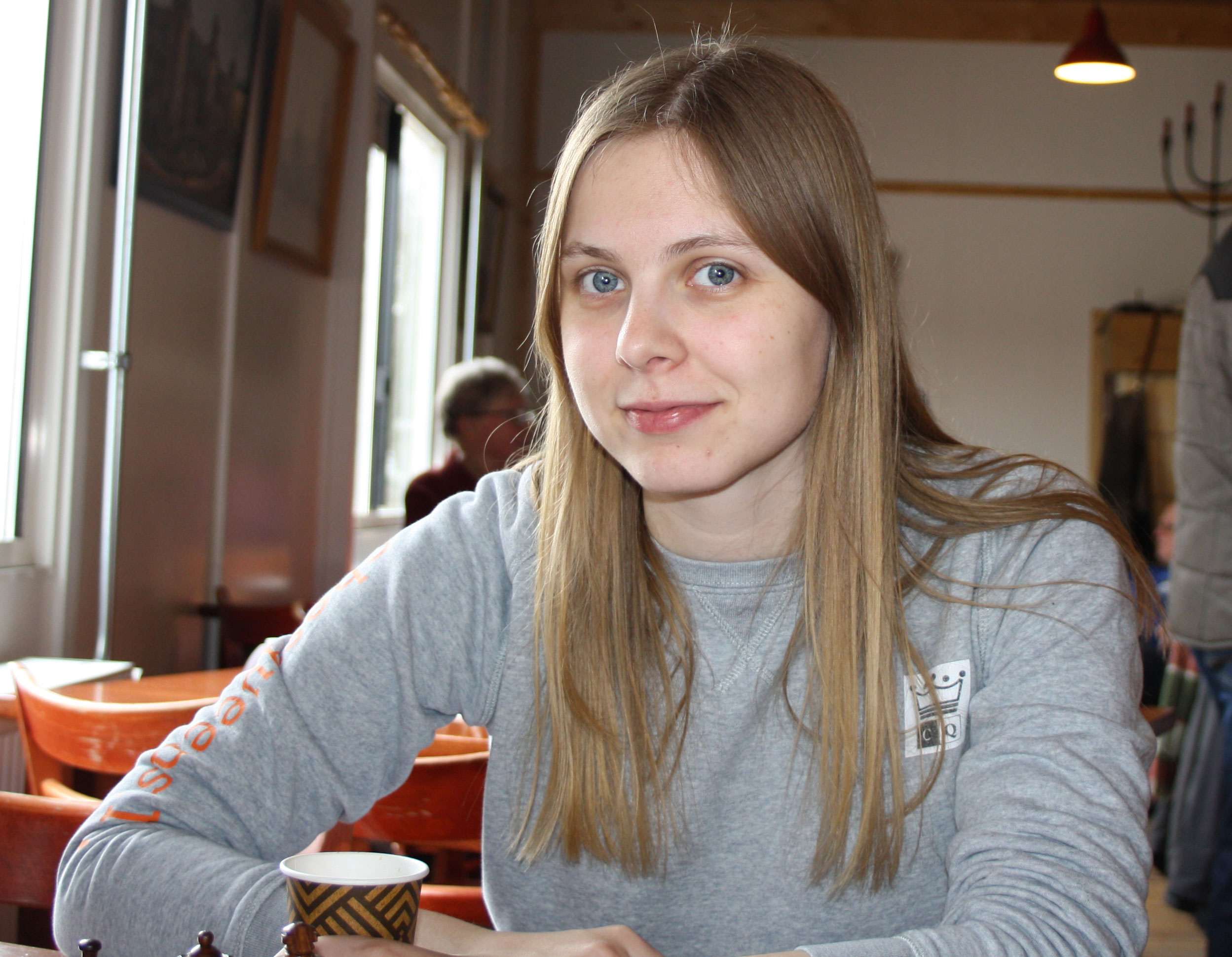 Anne Haast tijdens het Schaakfestijn op Slot Schaesberg 2018